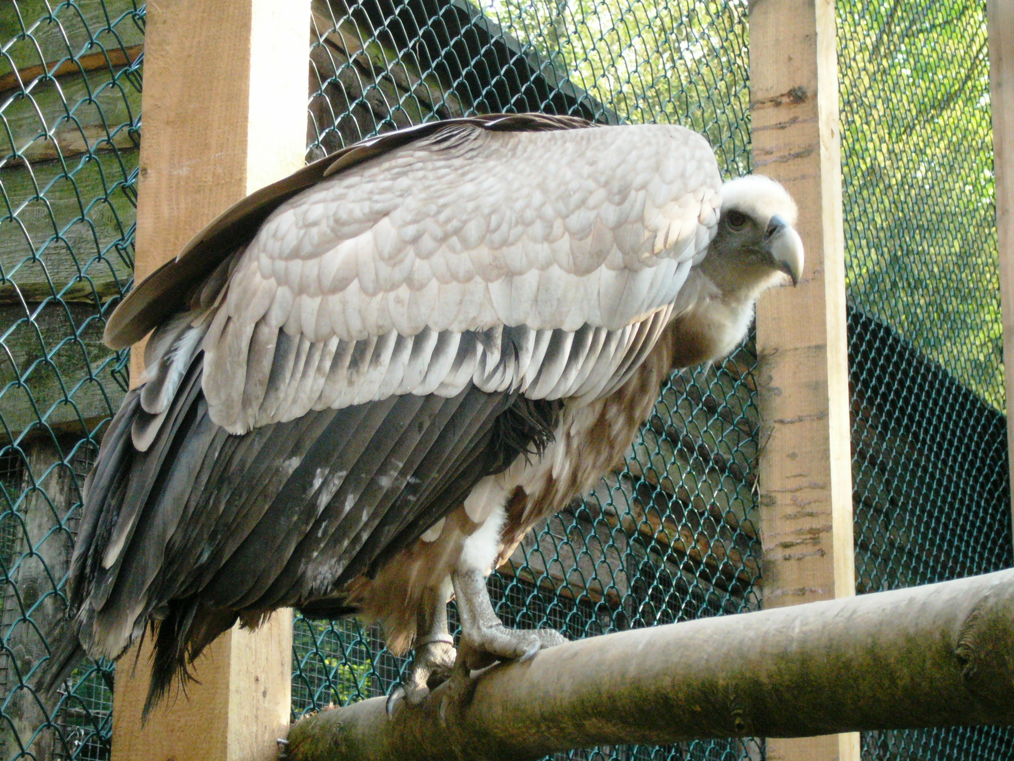 Schneegeier,Harzfalkenhof Bad Sachsa